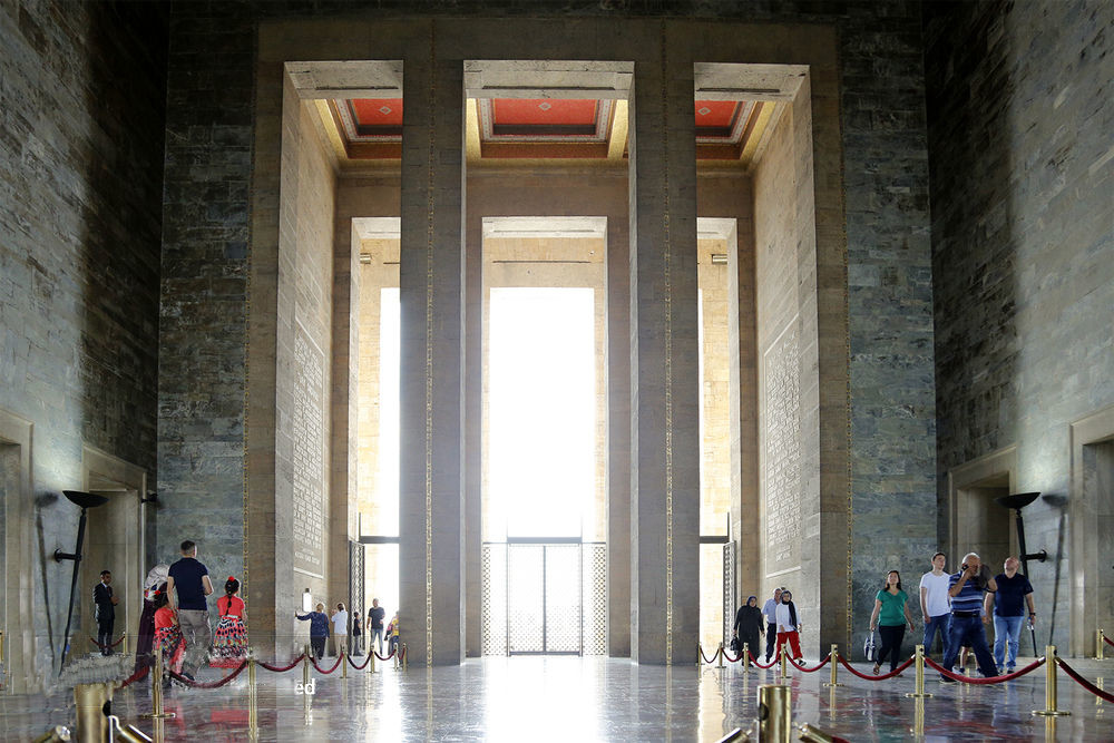 آنیت‌کابیر